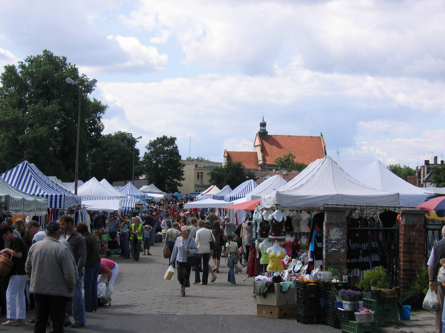 Targowisko miejskie w Słupcy,dzień targowy, Słupca, czerwiec 2007. W tle 15-wieczny kościół gotycki pod wezwaniem św. Wawrzyńca (foto:M.Majdecki).